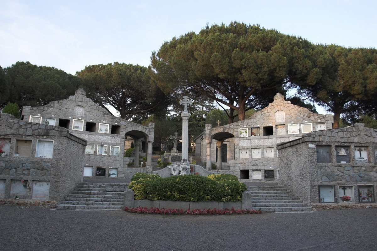 Cementiri municipal (Cardedeu-Vallès Oriental-Catalunya). Panteó de Marc Viader amb escultures d'Enric Clarasó